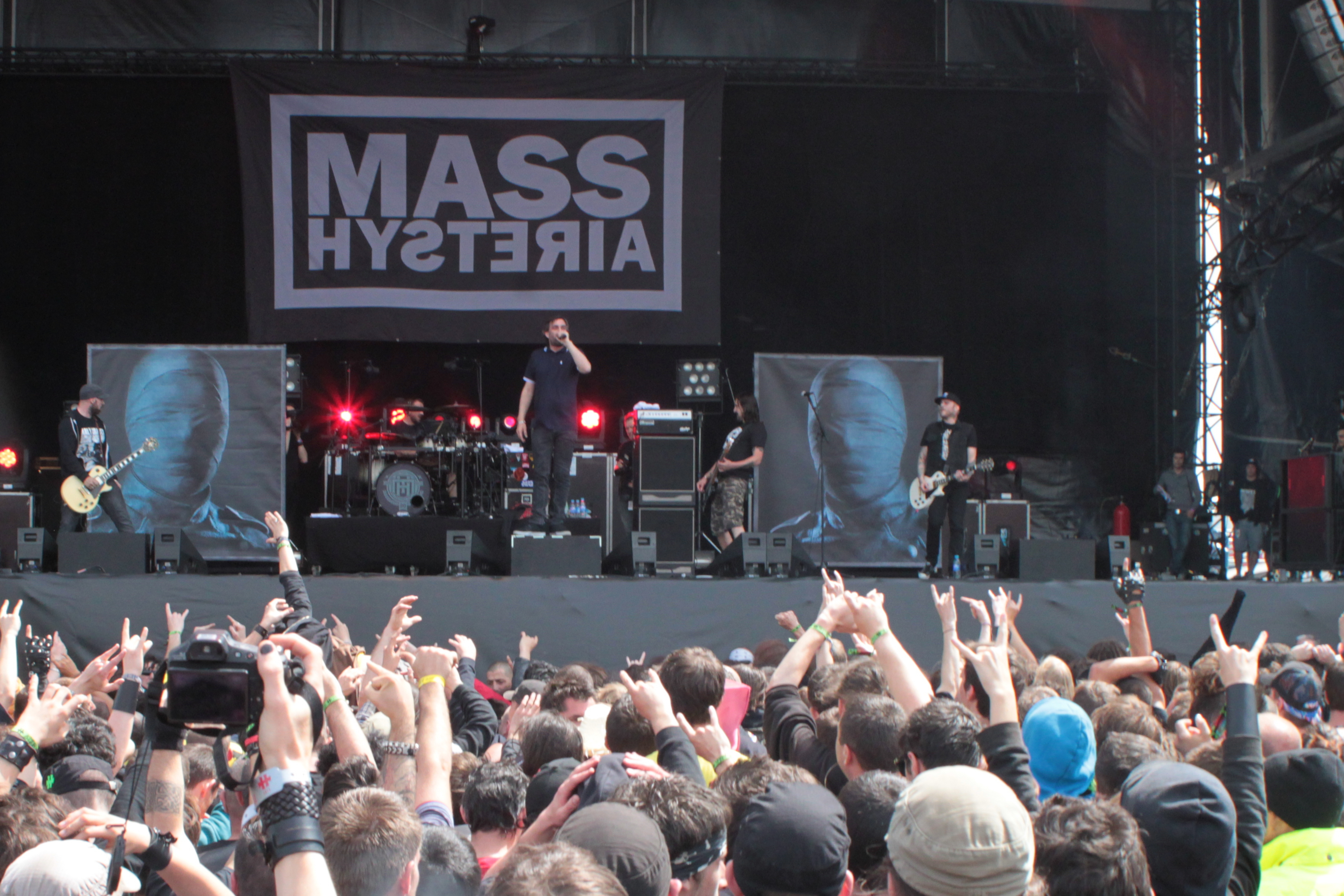 Mass Hysteria, Helfest 2013, Fr-44-Clisson.